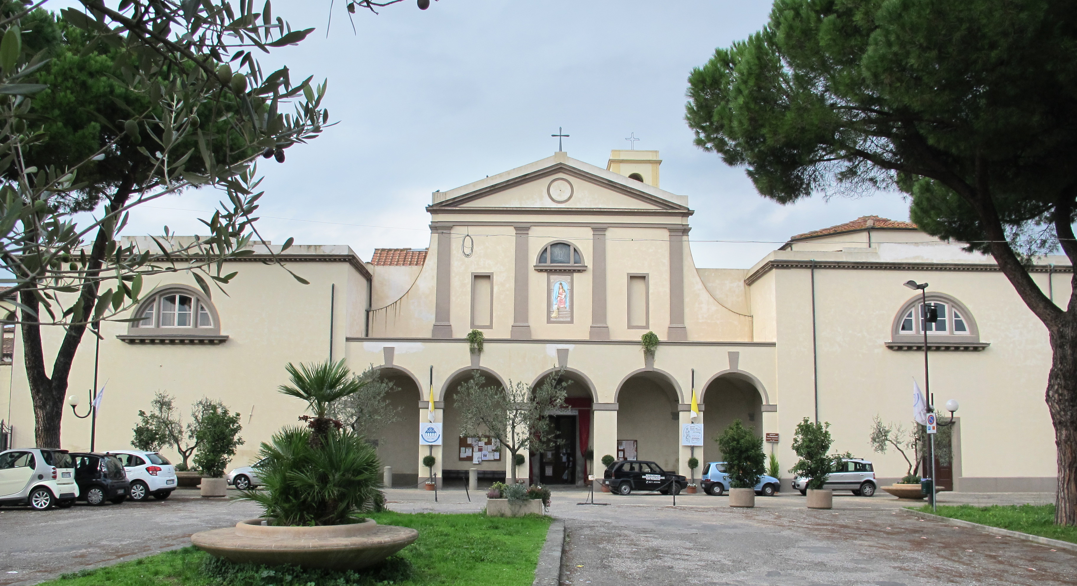 San Romano (Montopoli in Val d'Arno)